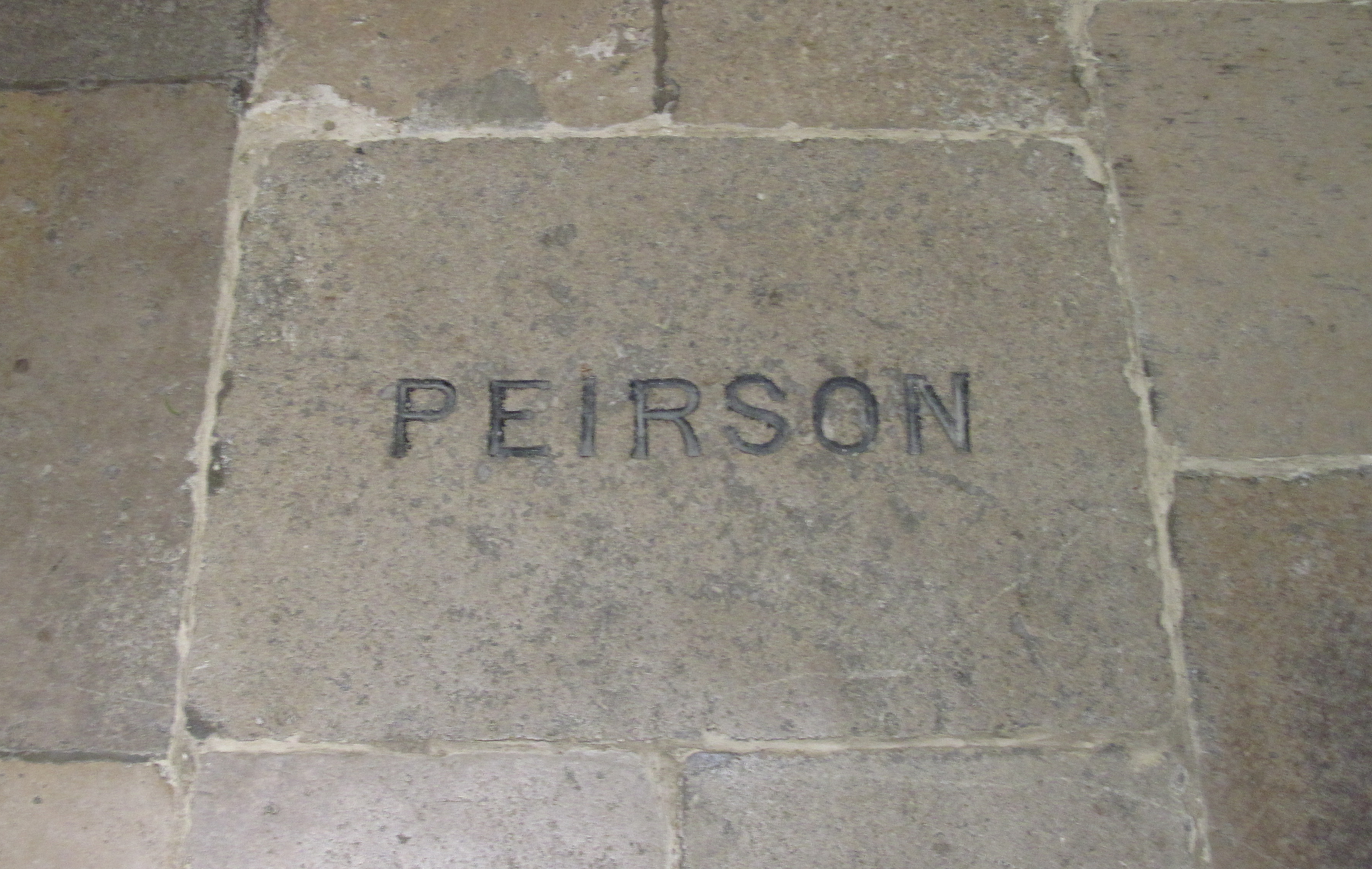 Nrf: La sépultuthe du Mâjeur Peirson dans l'églyise dé Saint Hélyi, Jèrri